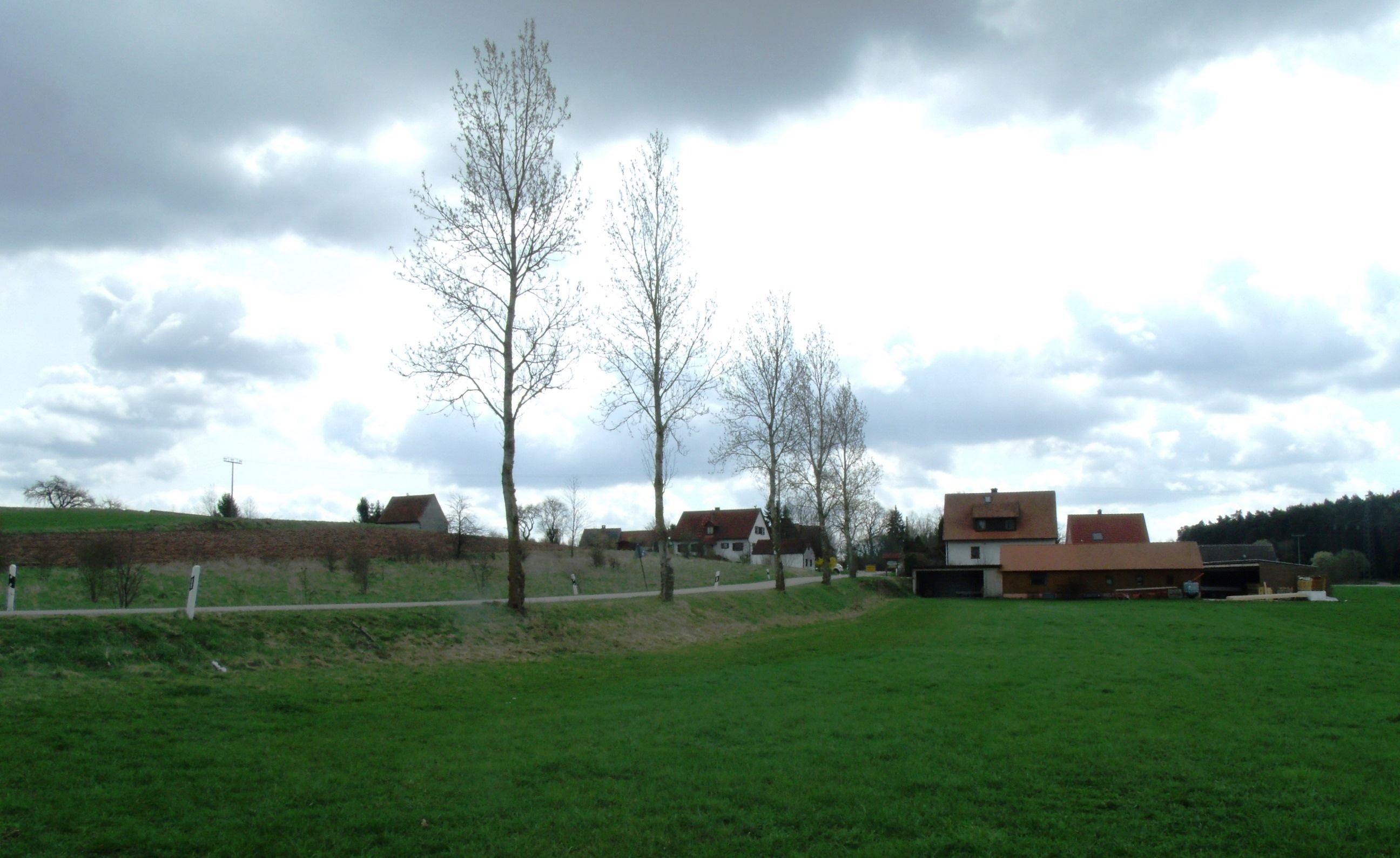 Lengenfeld, Ortsteil von Leutershausen, nordwestlicher Ortseingang